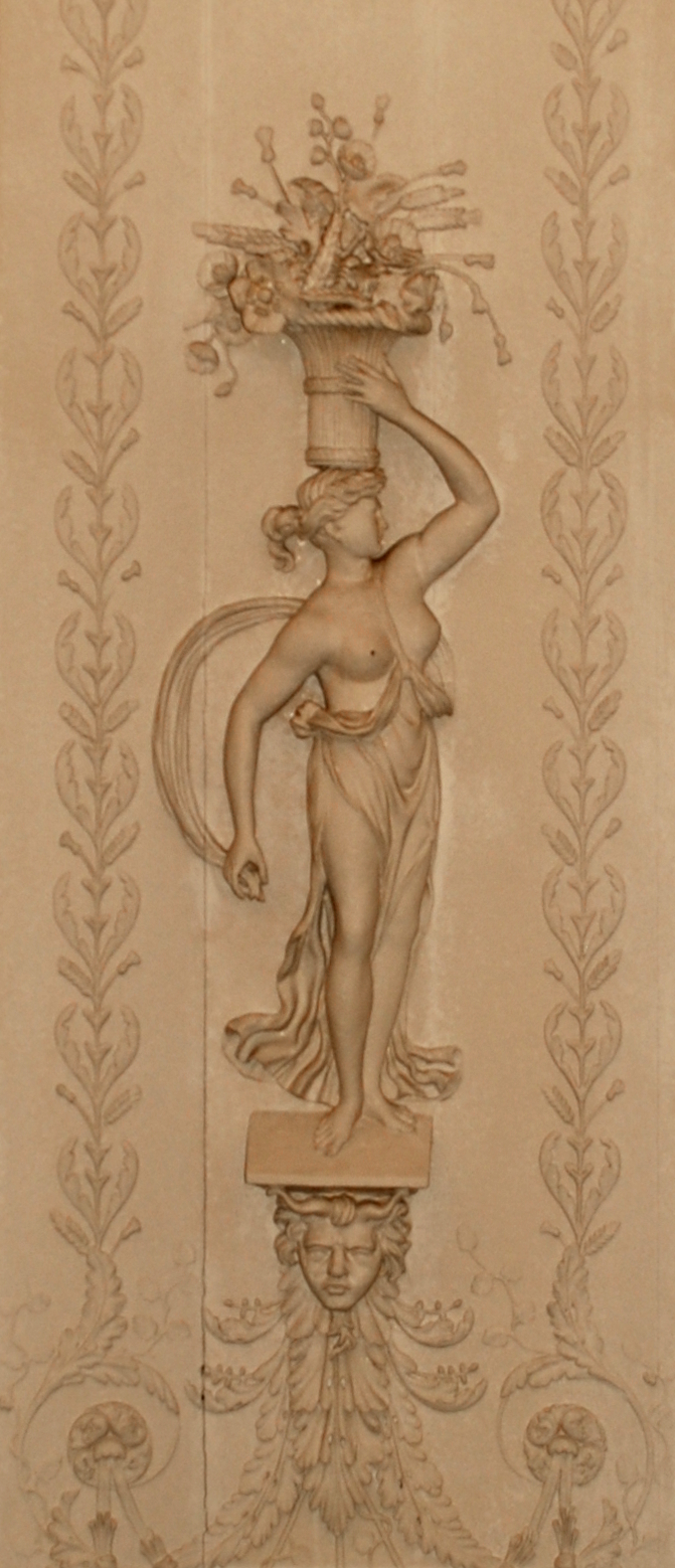 Belgique - Brabant wallon - Halles universitaires de Louvain-la-Neuve (rue des Wallons) - Rotonde This photo of immovable heritage has been taken in the Walloon Region